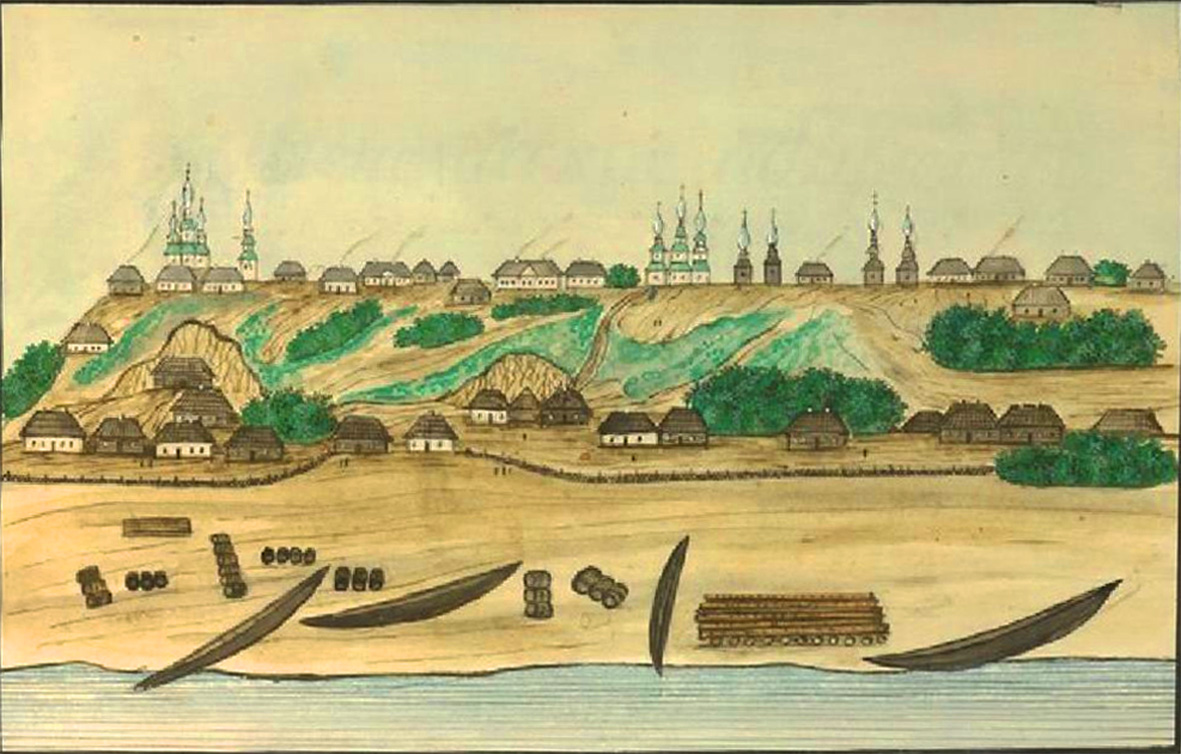 Чорнобиль. Домінік П'єр де ля Фліз. «Медико-топографічний опис... Київської округи...». Київ, 1854. - с. 842